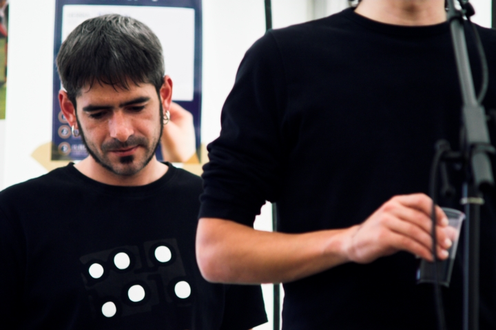 Unai Iturriaga bertsolaria.